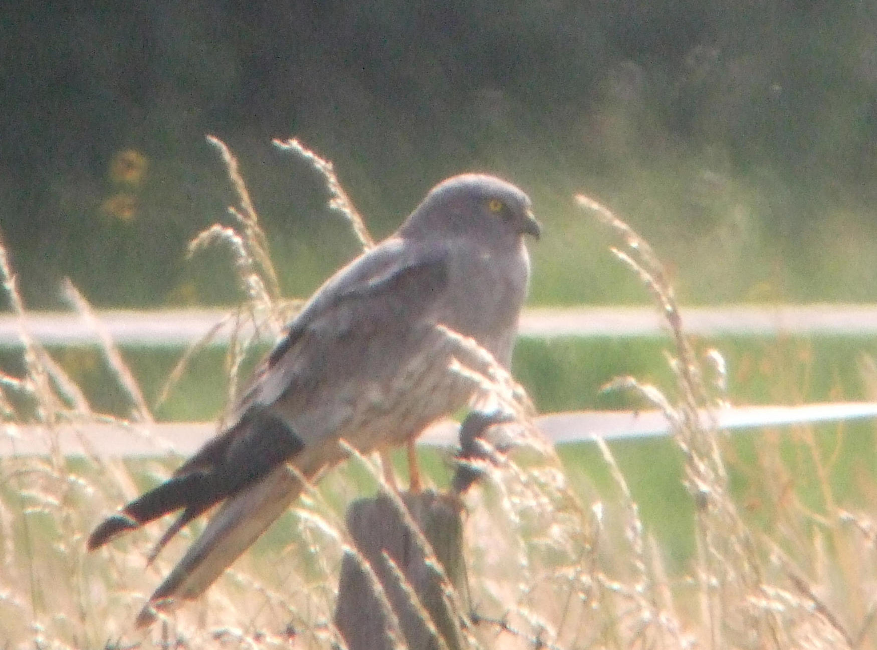 Adult male Montagu's Harrier(Circus Pygargus), Saint-Maurice sur Dargoire, France.